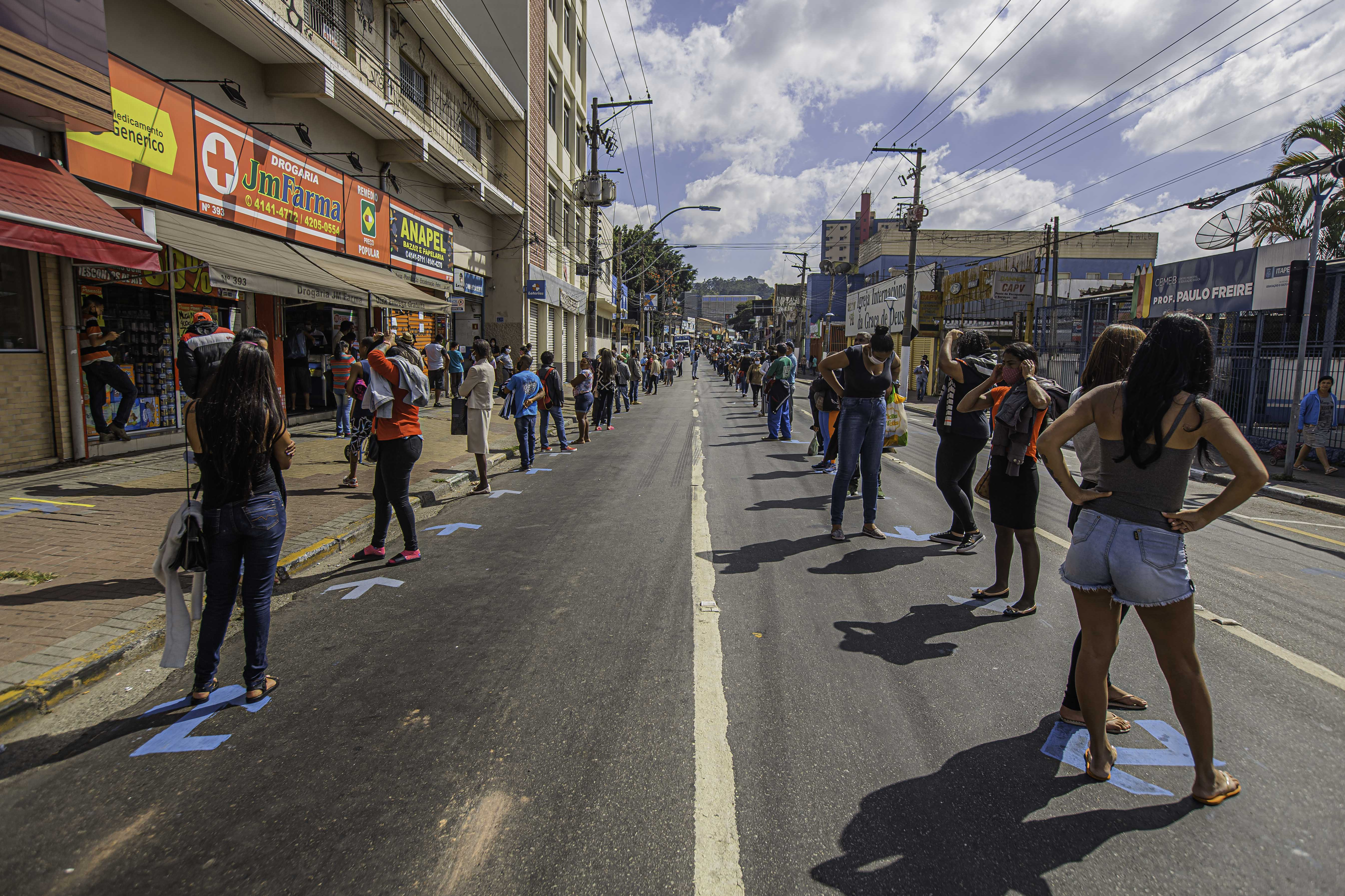 Foto: Felipe Barros/ExLibris/PMI